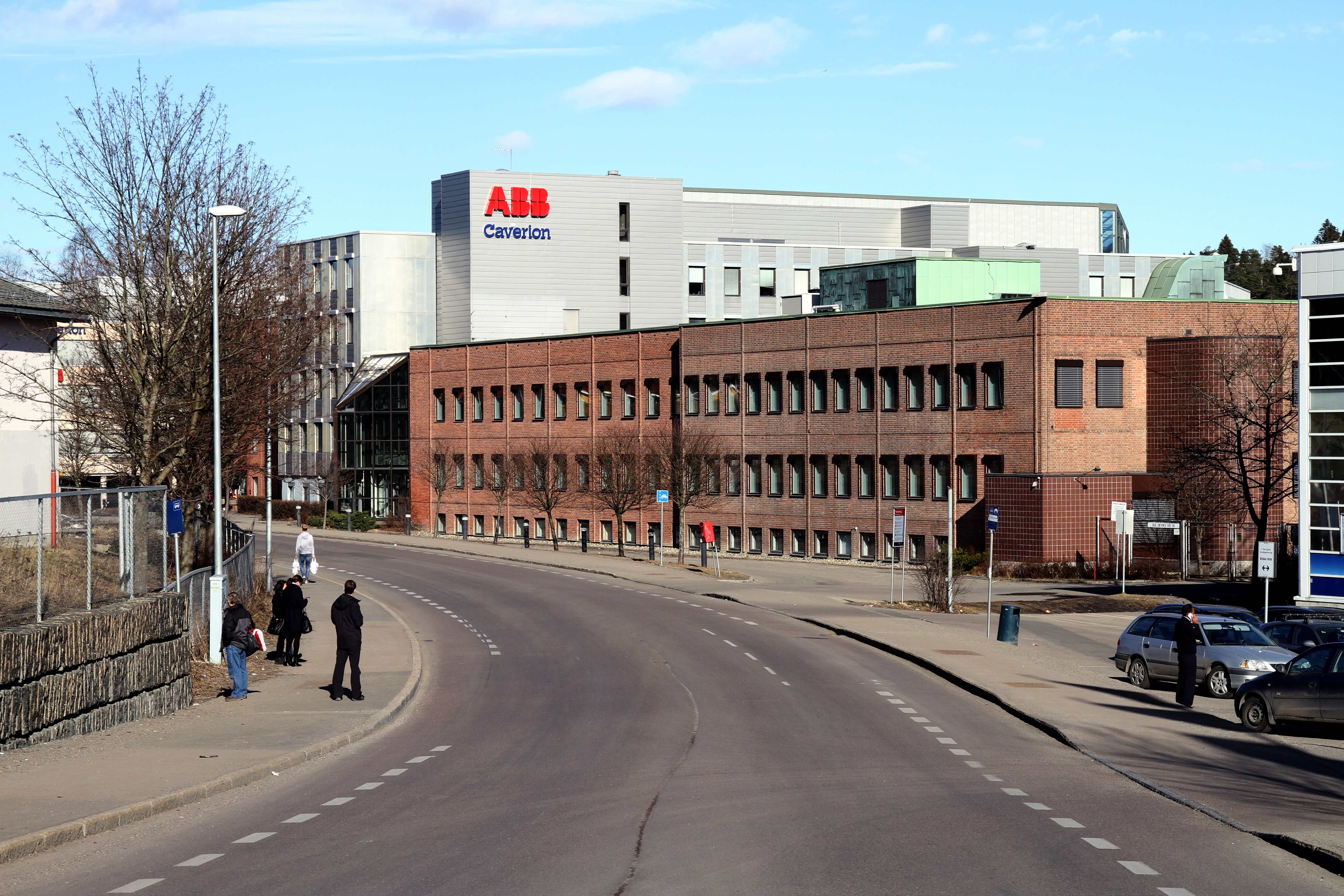 Ole Deviks vei i Bydel Alna i Oslo.